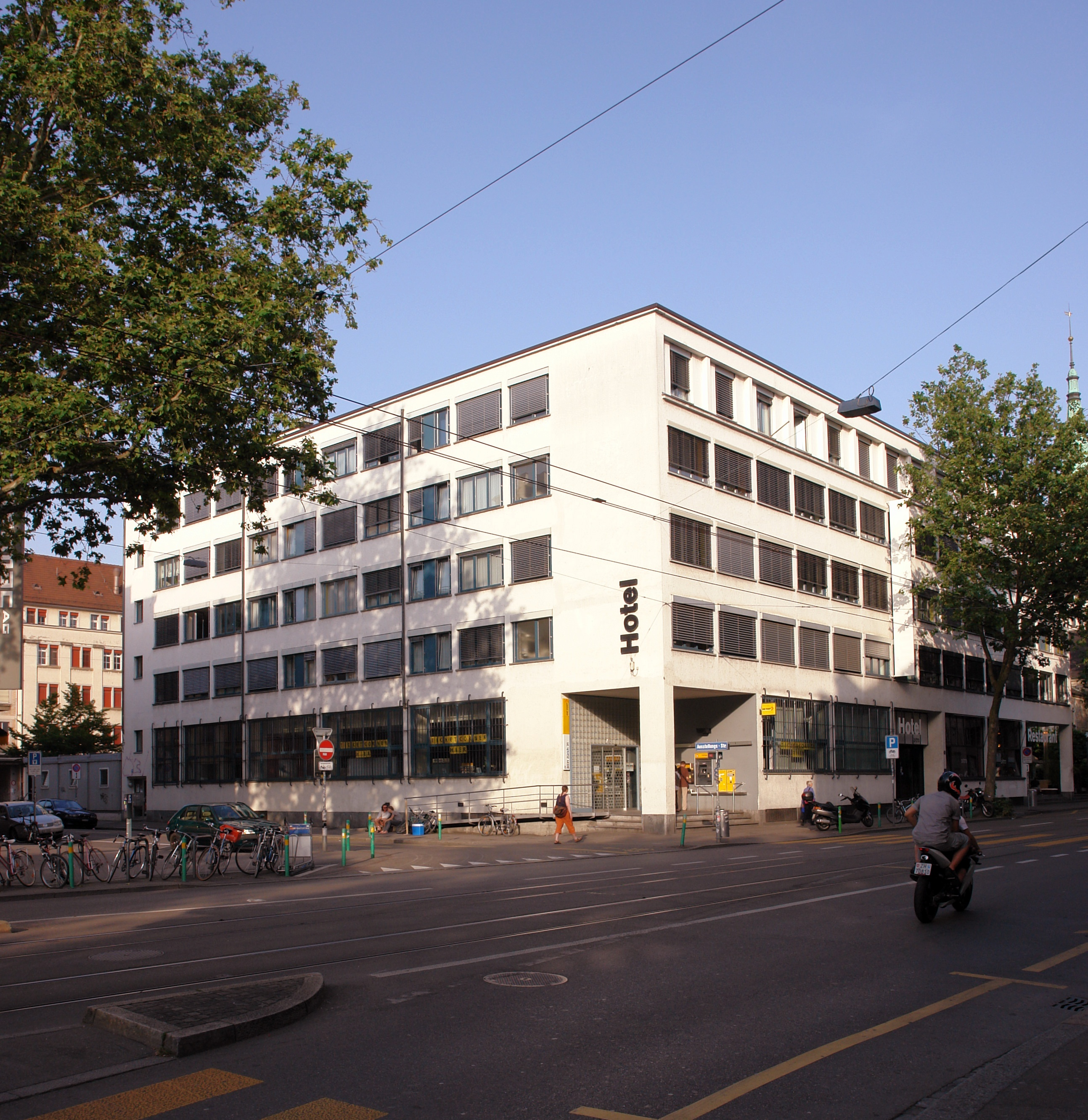 Limmathaus, Zürich Ausführung 1930-1931 Architekt: Steger und Egender